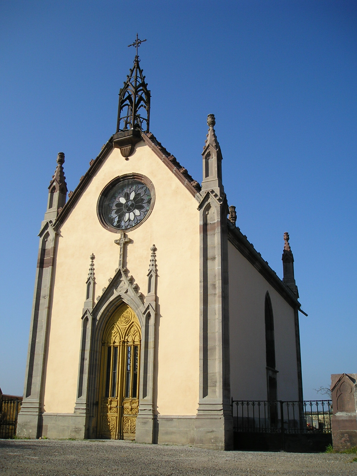 La chapelle XIXème de cimetière de Meurcourt